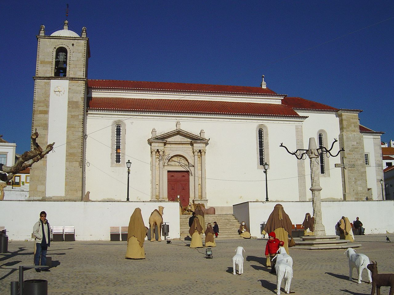 Natal de 2005